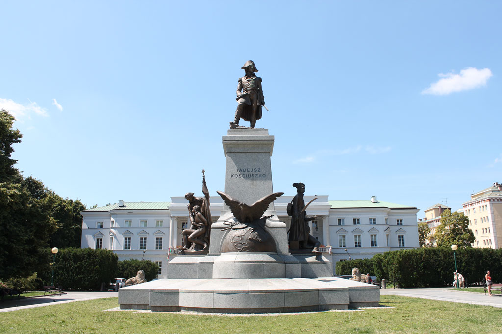 Monumento en honor al héroe polaco Tadeusz Kościuszko.